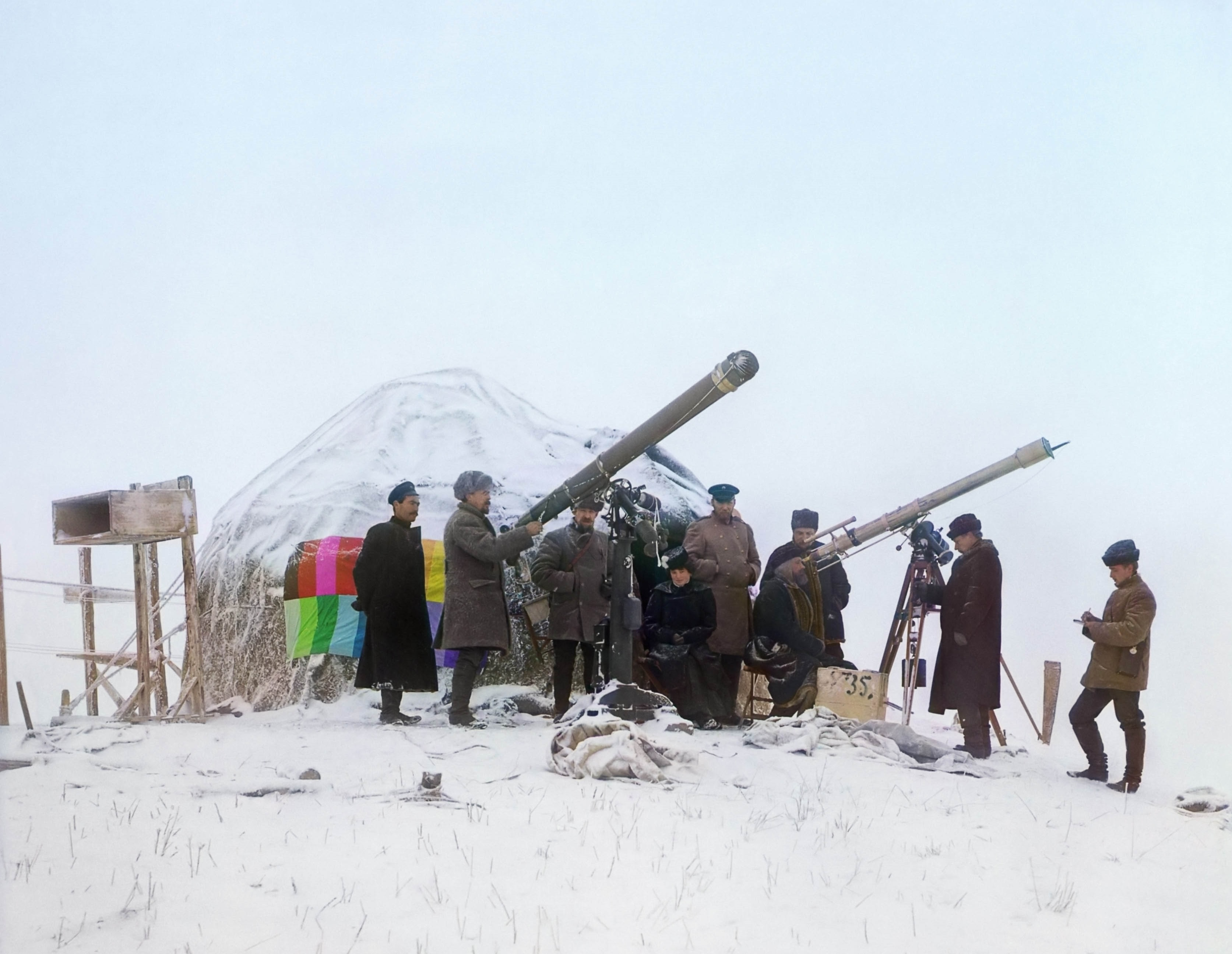 Observations Solar eclipse of January 14, 1907 in the Tian Shan Mountains (present-day Tajikistan). В декабре 1906 года Прокудин-Горский первый раз отправляется в Туркестан для фотографирования солнечного затмения 14 января 1907 года (по старому стилю 1 января 1907 года) в горах Тянь-Шаня близ ст. Черняево над Салюктинскими копями. В более позднее время это район Сулюкты – угольные копи в горах Зеравшанской области в 20 км от станции Драгомирово, позже г. Пролетарск, недалеко от Ходжента – ныне и Сулюкта и бывш. Пролетарск на территории Таджикистана. Хотя затмение не удалось запечатлеть из-за облачности, в январе 1907 года Прокудин-Горский делает много цветных снимков Самарканда и Бухары.